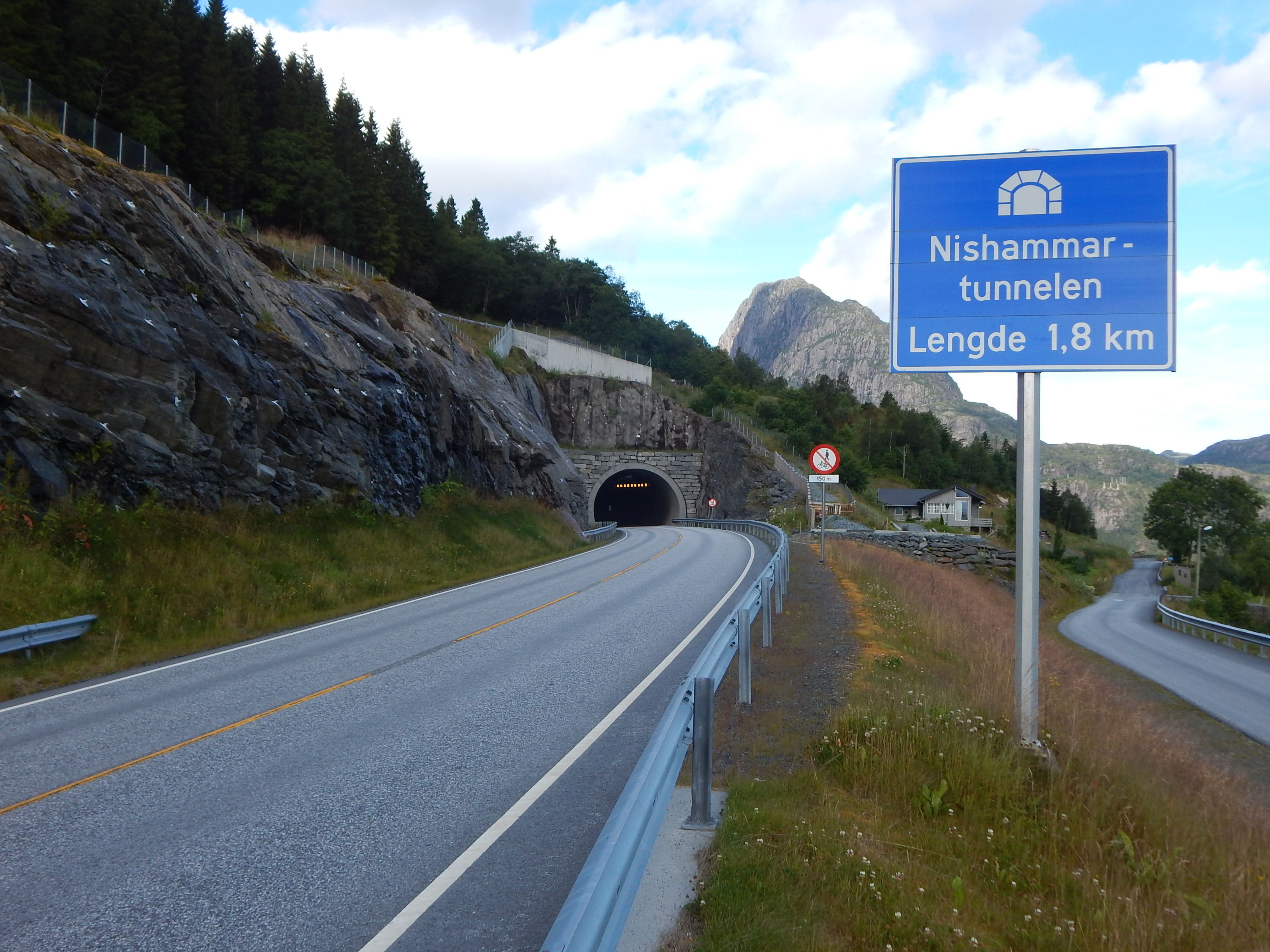 Nishammartunnelen på fylkesvei 57 i Fjaler kommune